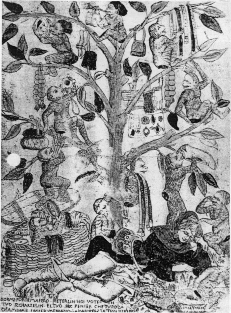 Pedlar robbed by monkeys.